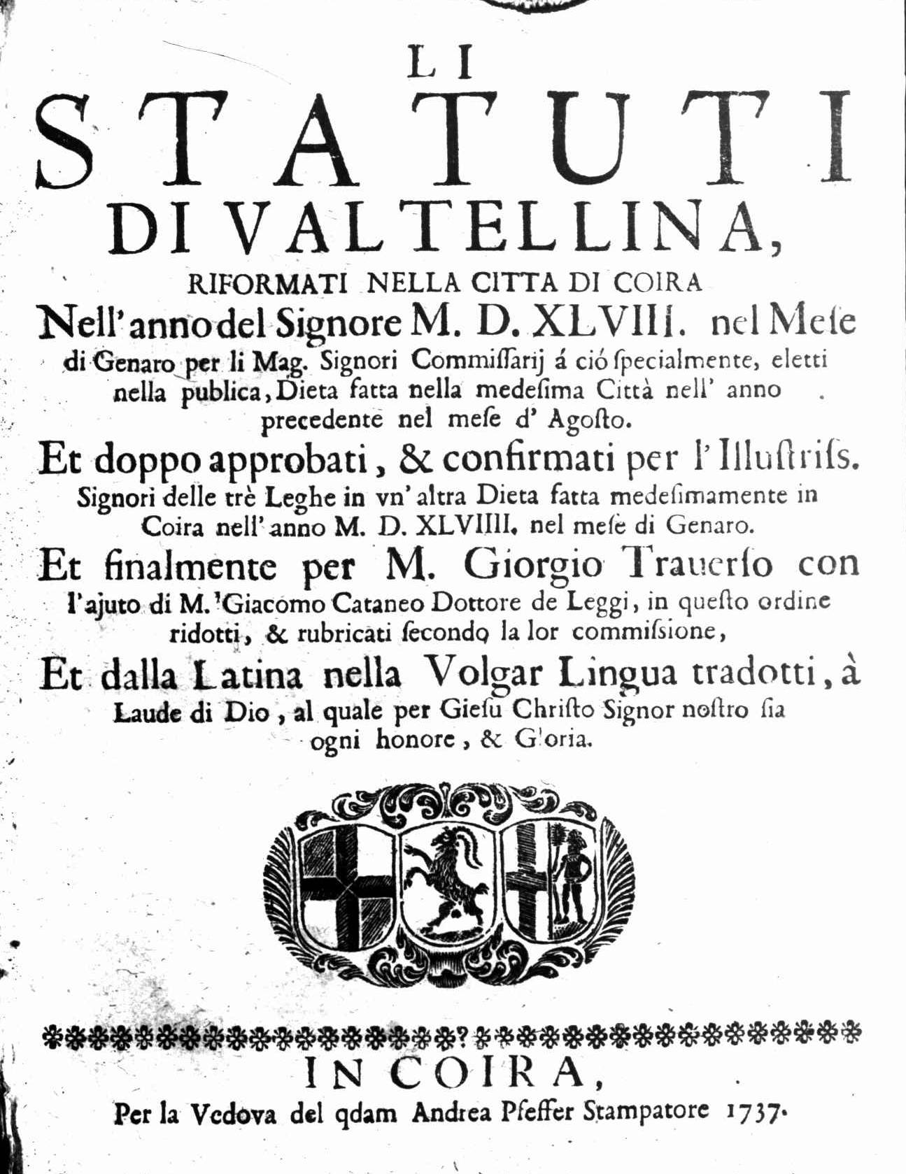 Frontespizio